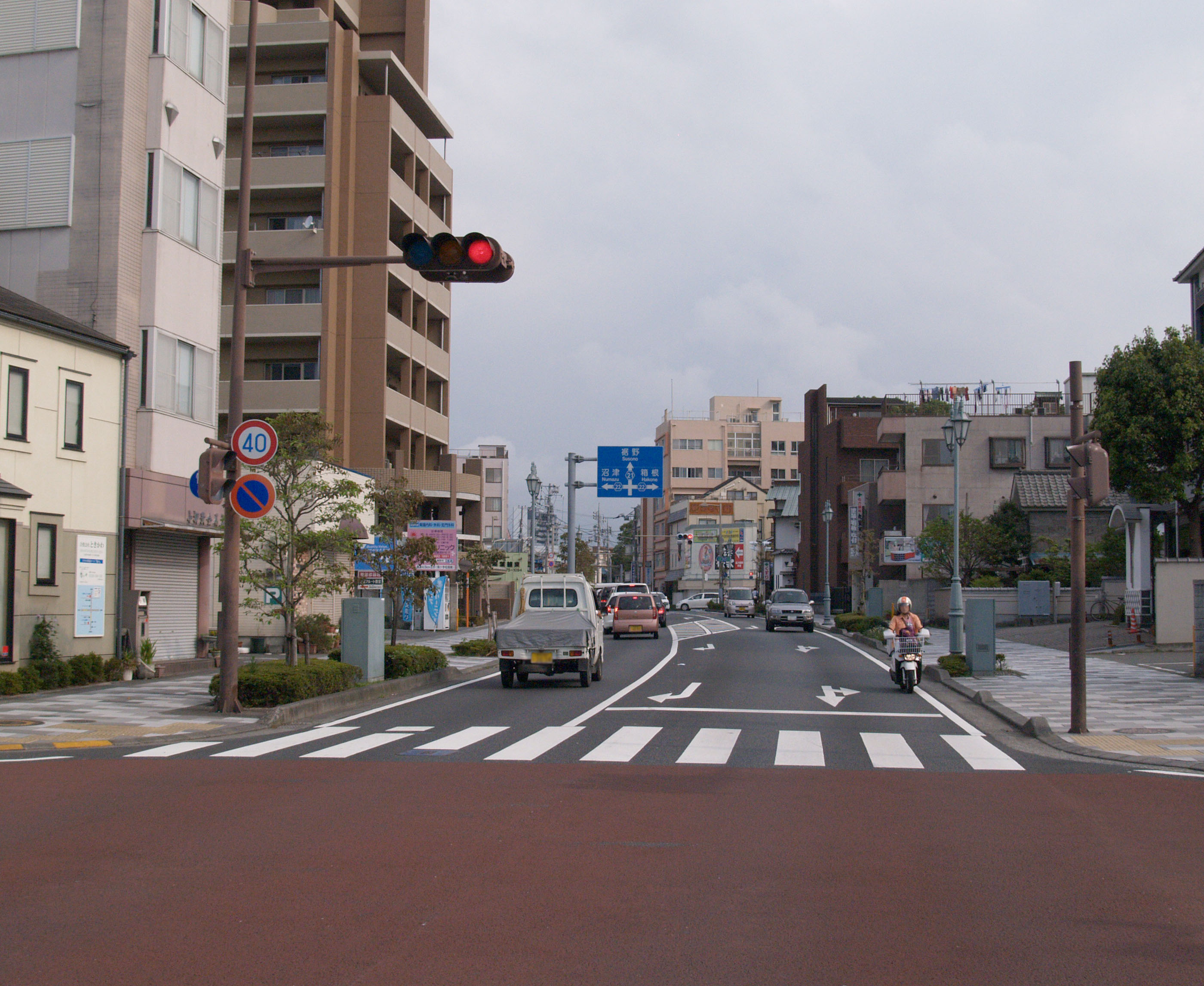 静岡県道21号三島裾野線（三島市役所前にて）